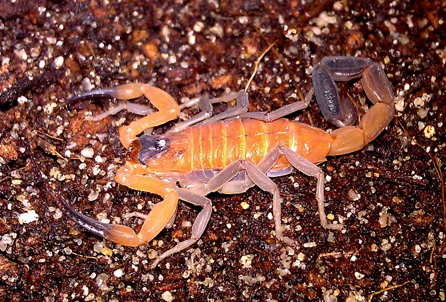 Rhopalurus junceus, 3.svlek